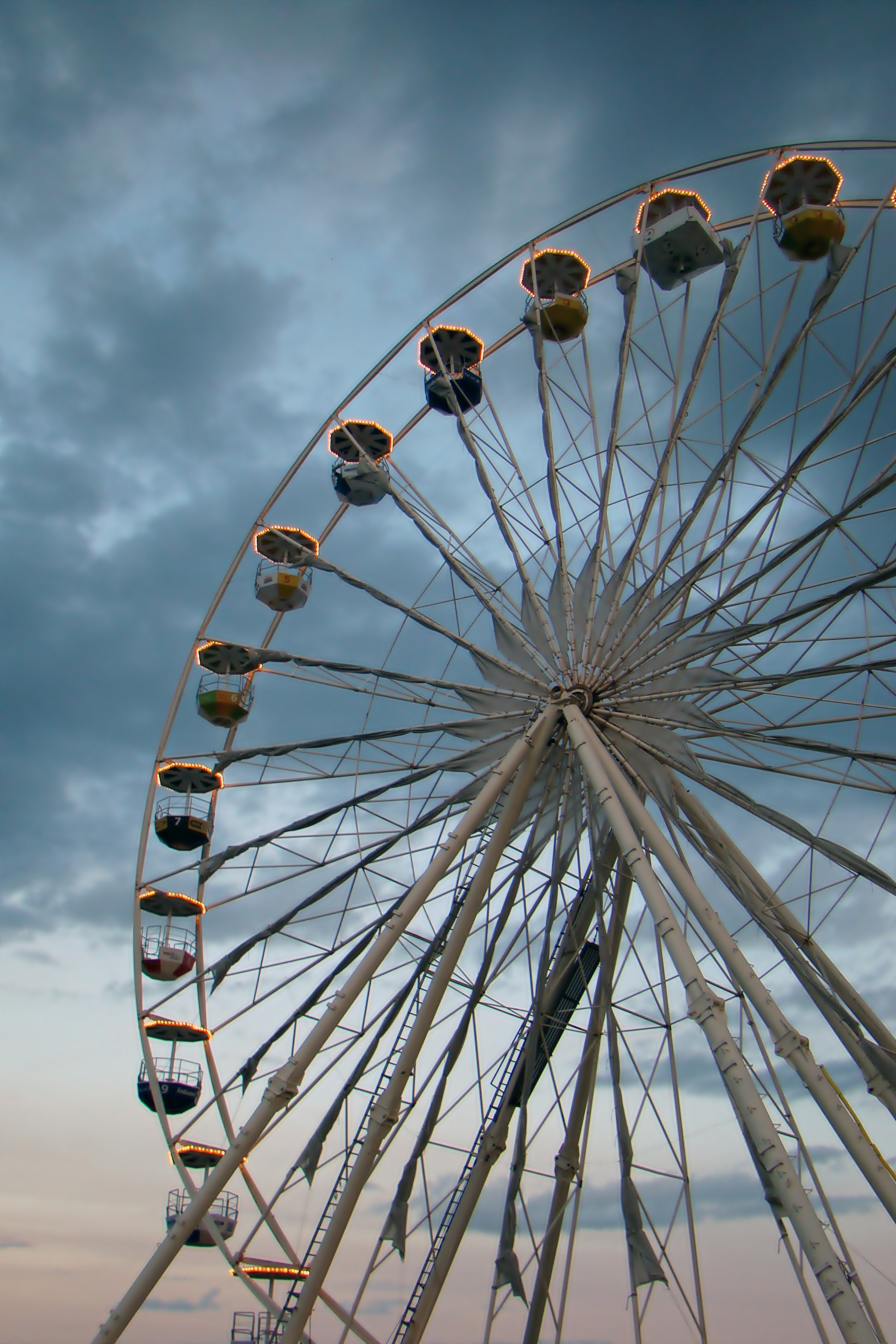 Roda Gigante Rio 2016 no Forte de Copacabana, Rio de Janeiro, Brasil.